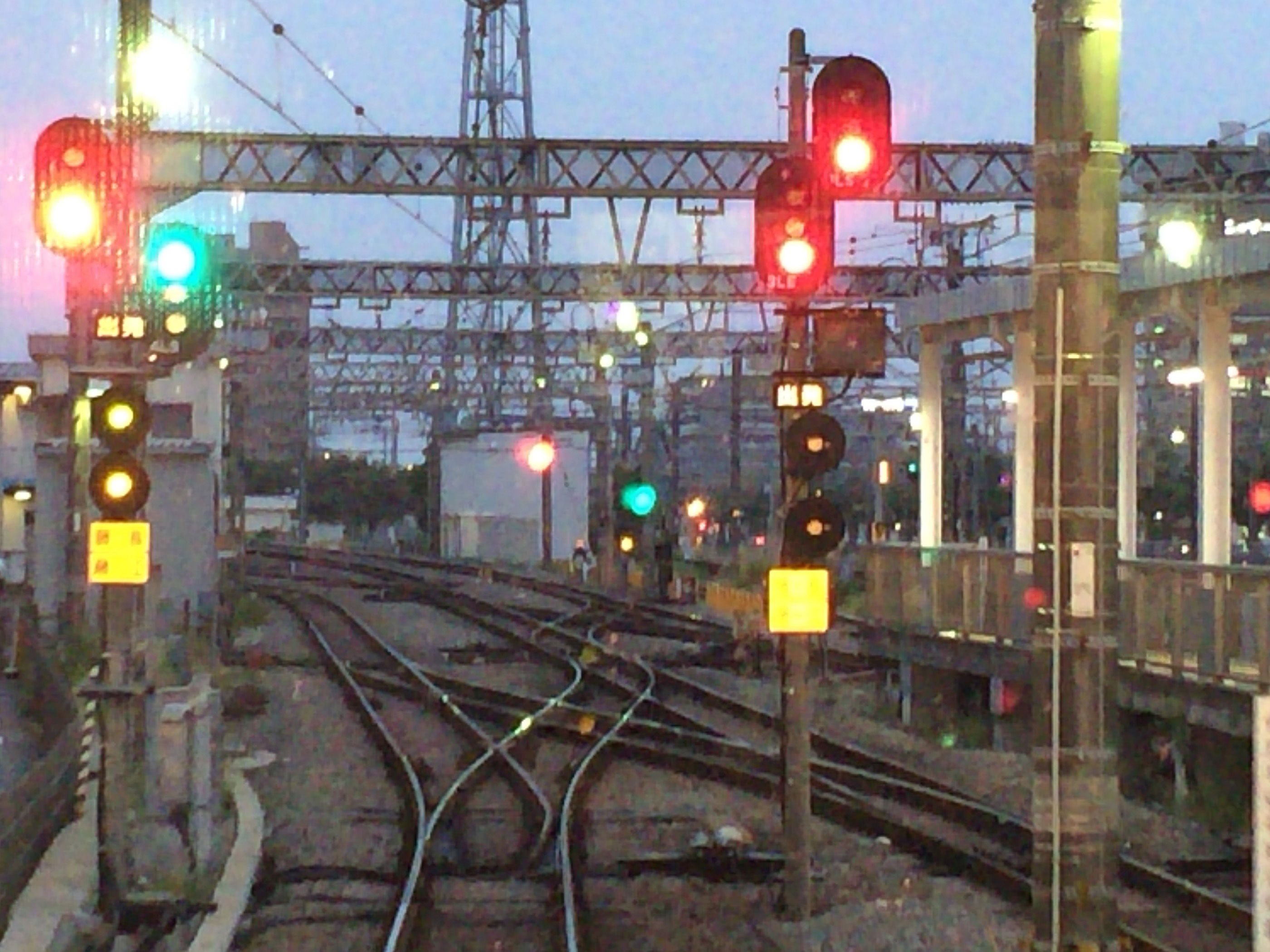 小田急藤沢駅 線路の様子 (スイッチバック )